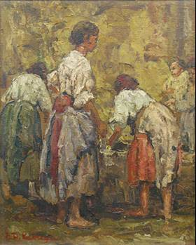 lavanderas EDKabregu